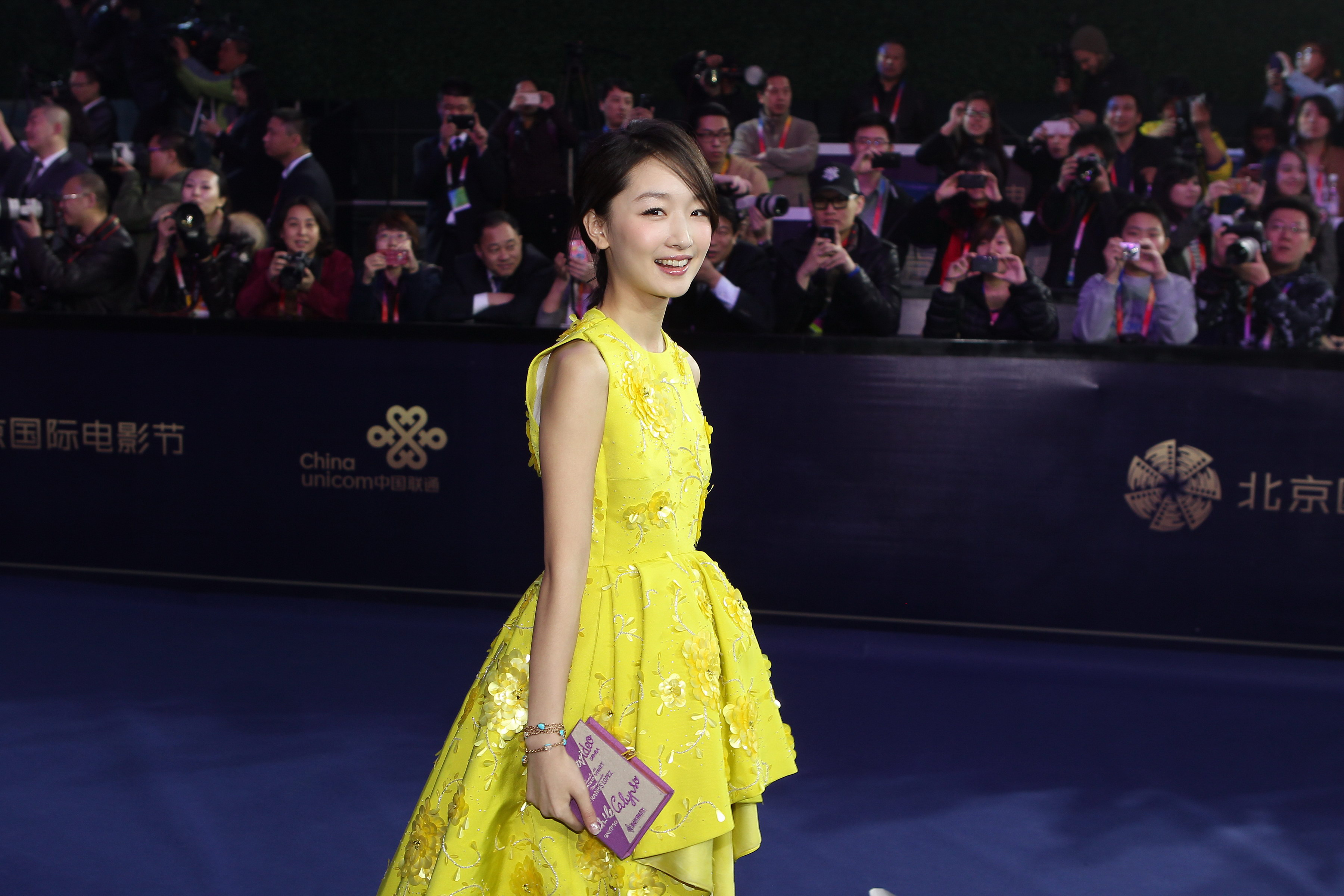 北京时间2013年4月23日晚，周冬雨在北京国际电影节闭幕式上